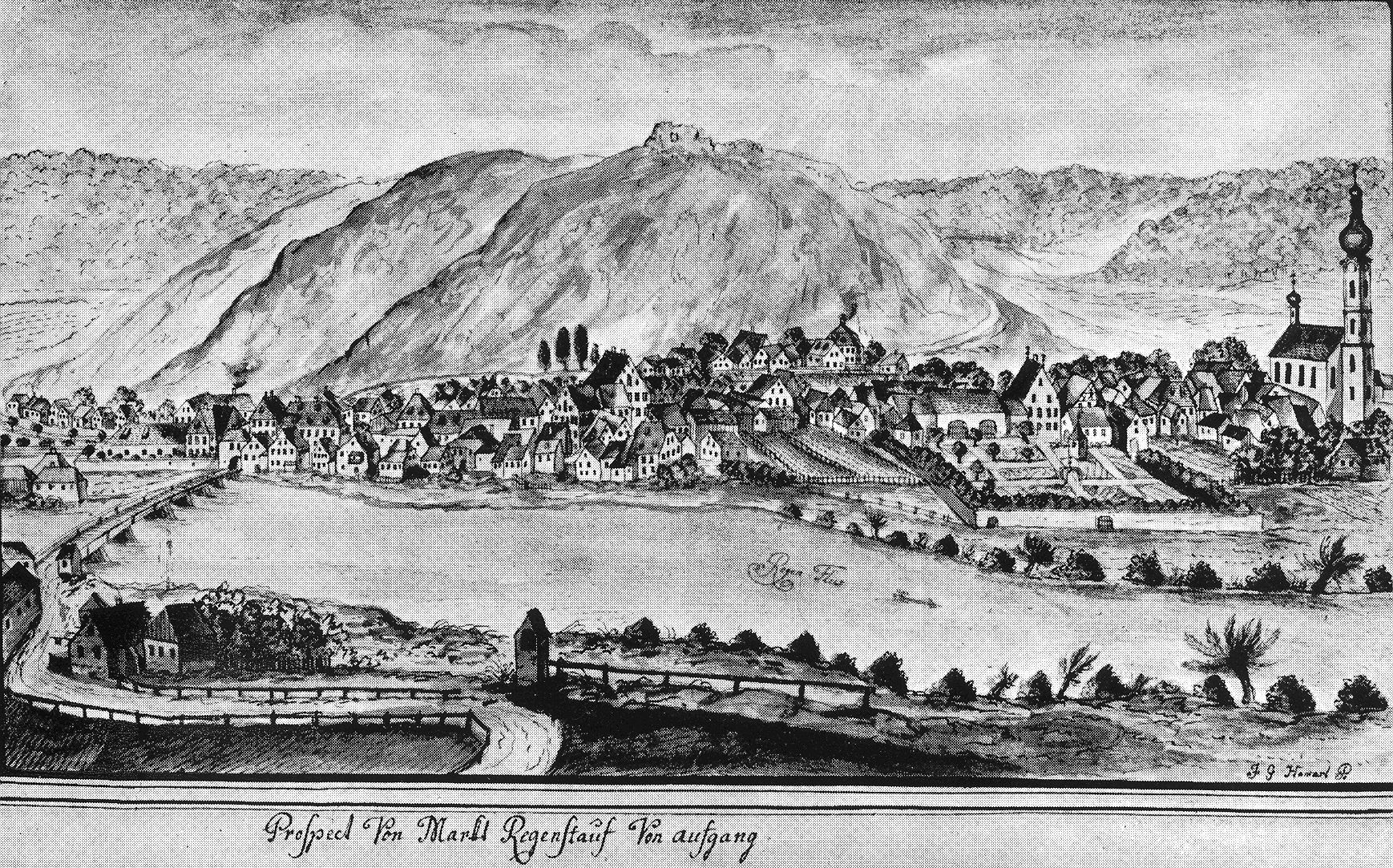 Prospekt von Regenstauf von Osten